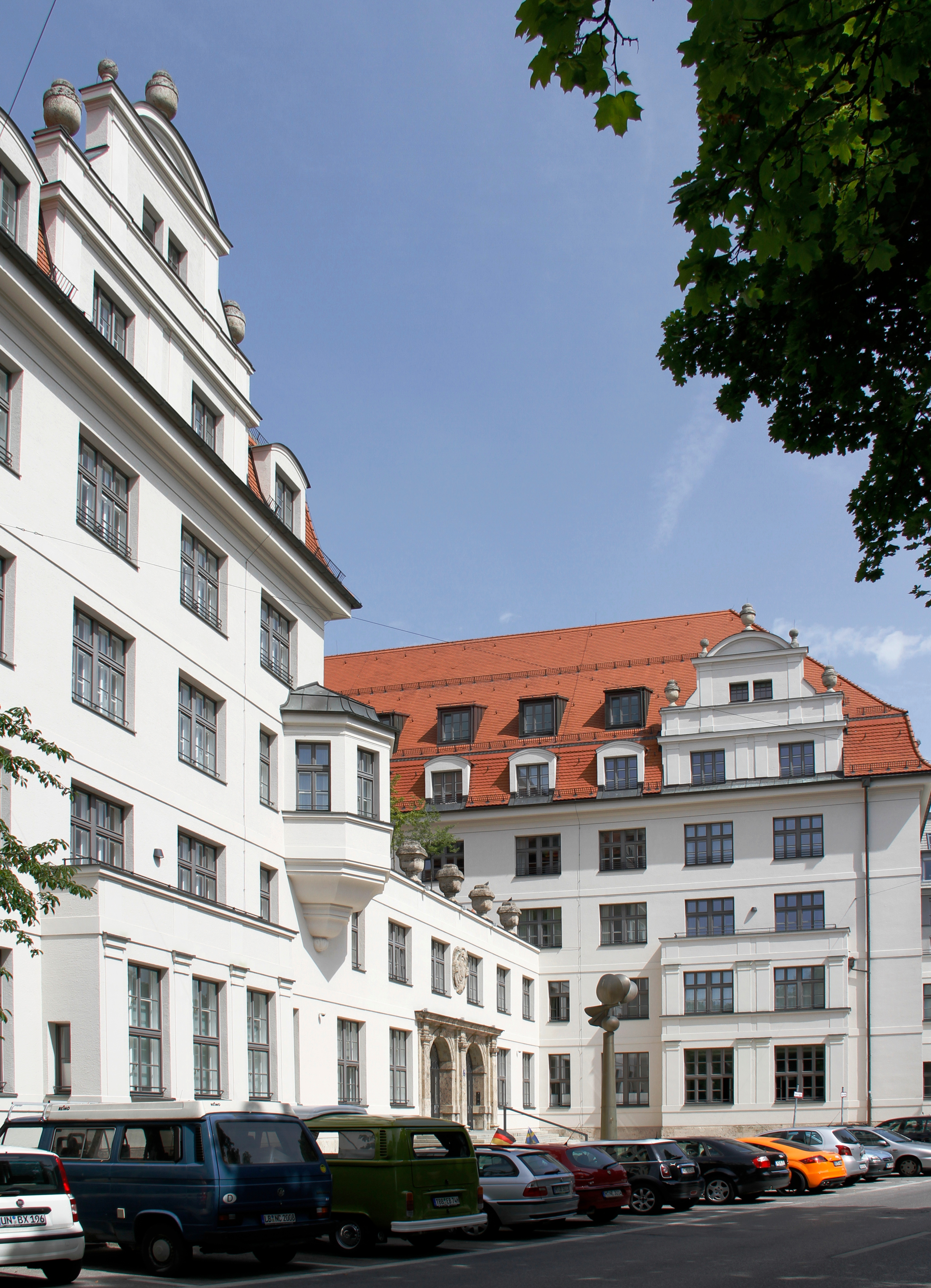 Thalkirchner Straße 54-60, München. Ehemaliges städtisches Arbeitsamt, errichtet 1912/13 von Hans Grässel. Umgebaut als Wohngebäude durch Phillipe Starck.